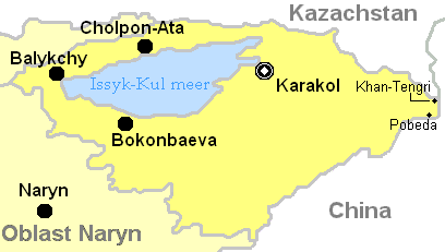 Kaartje van Ysykkul Provincie.